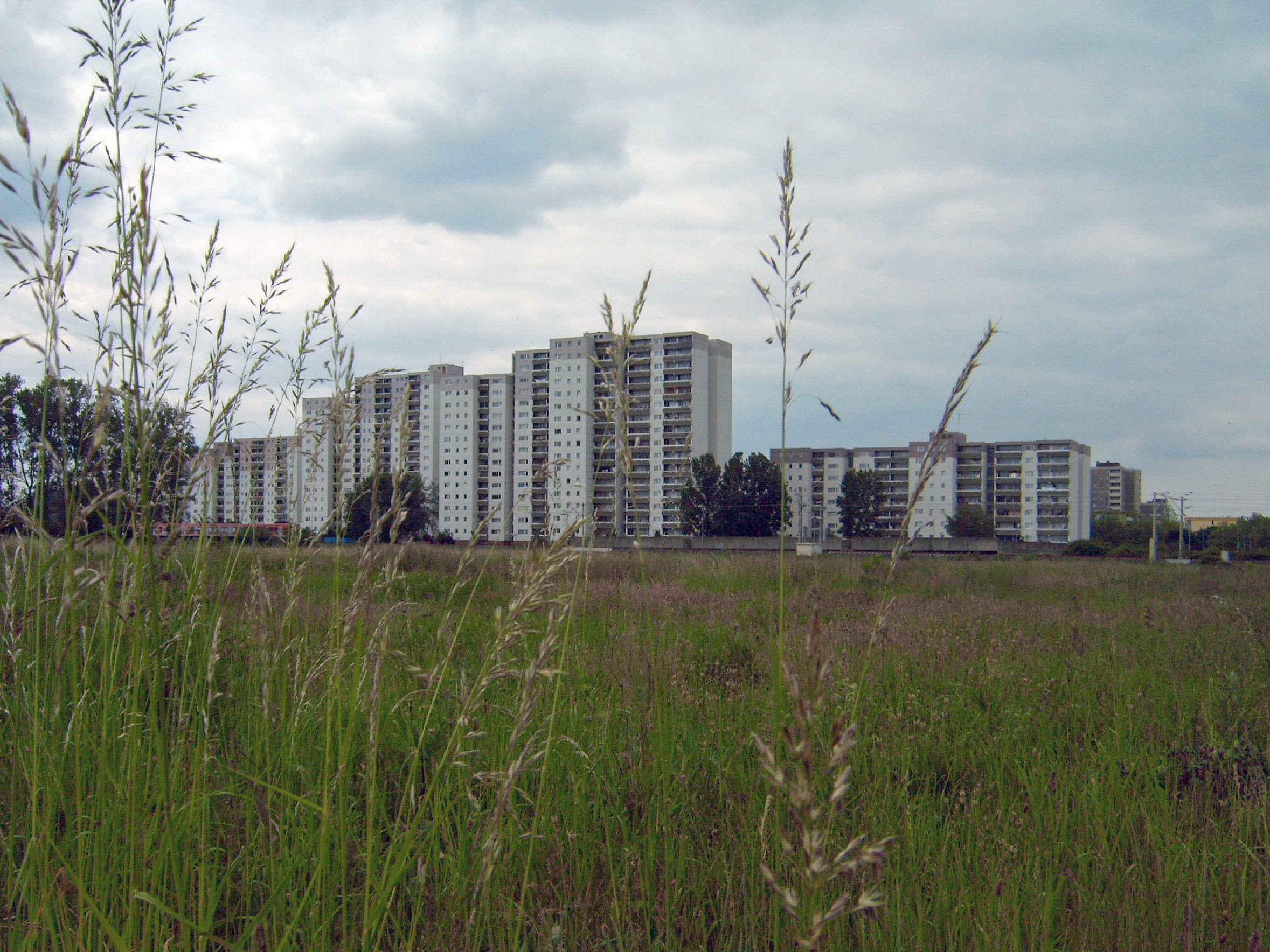 Spessartviertel